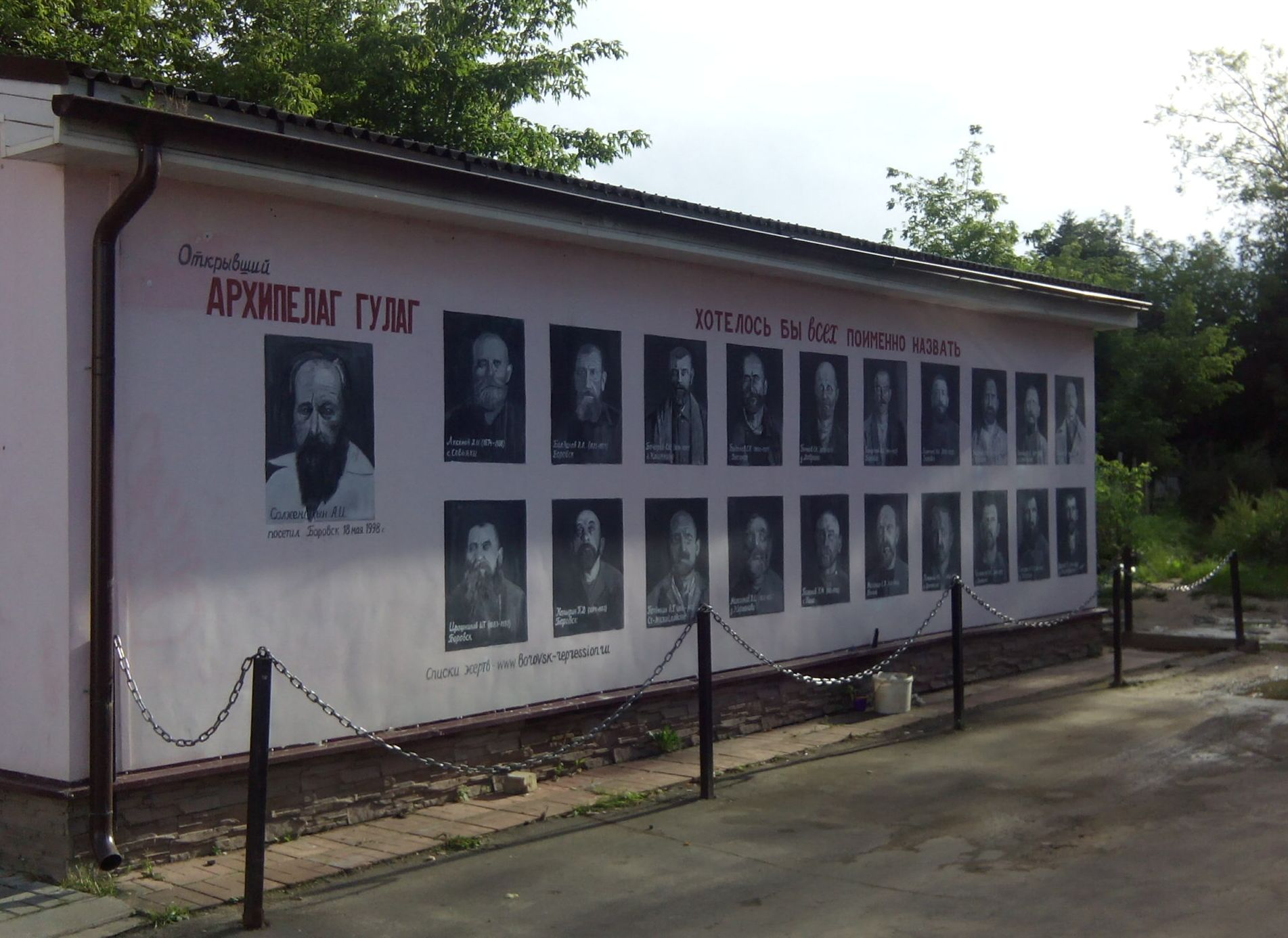 Галерея репрессированных , созданная художником Владимиром Овчинниковым в 2016 в городе Боровск Калужской области